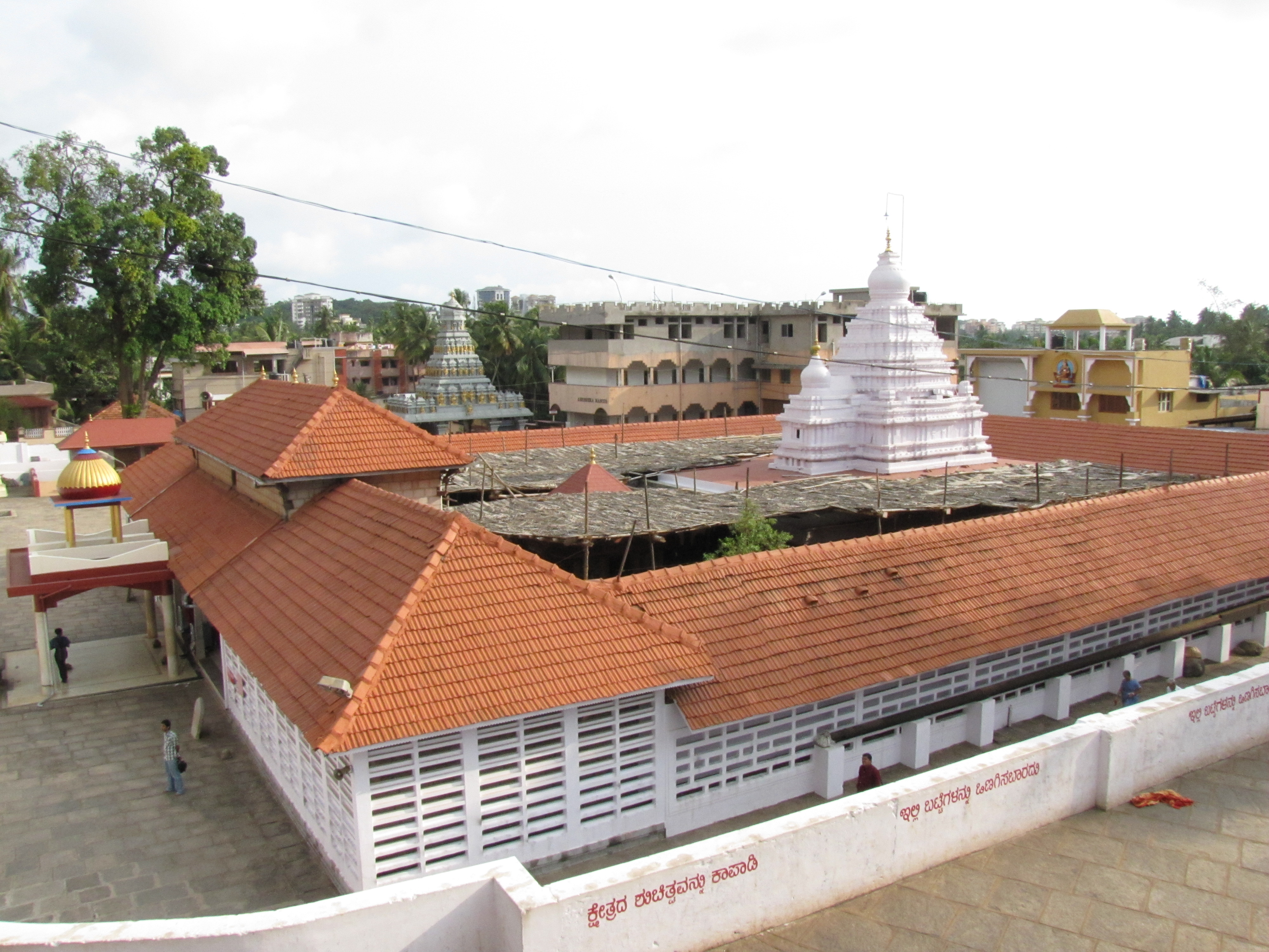 Kadri temple